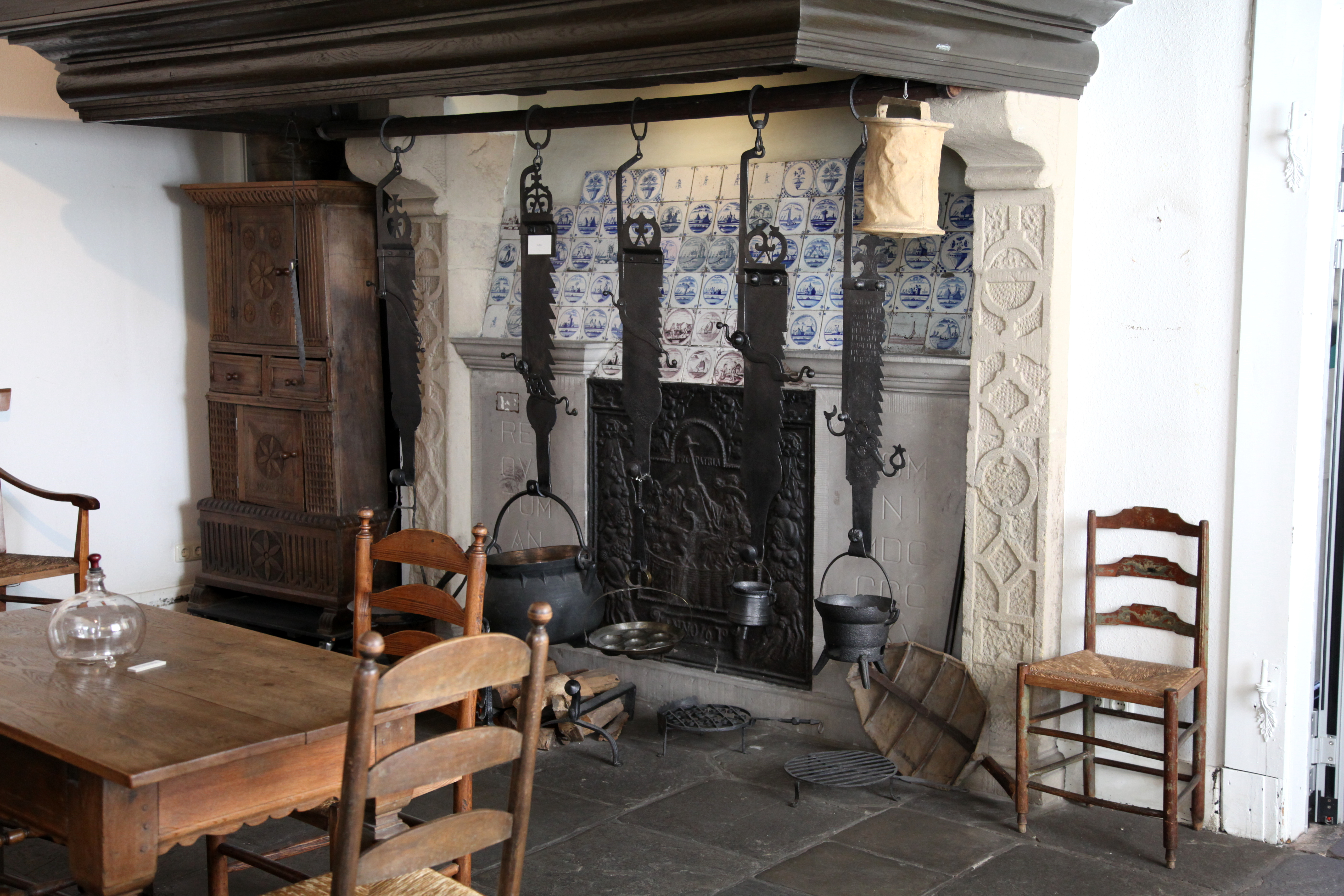 Museum der Stadt Gladbeck im Schloss Wittringen in der Freizeitstätte Wittringen in Gladbeck